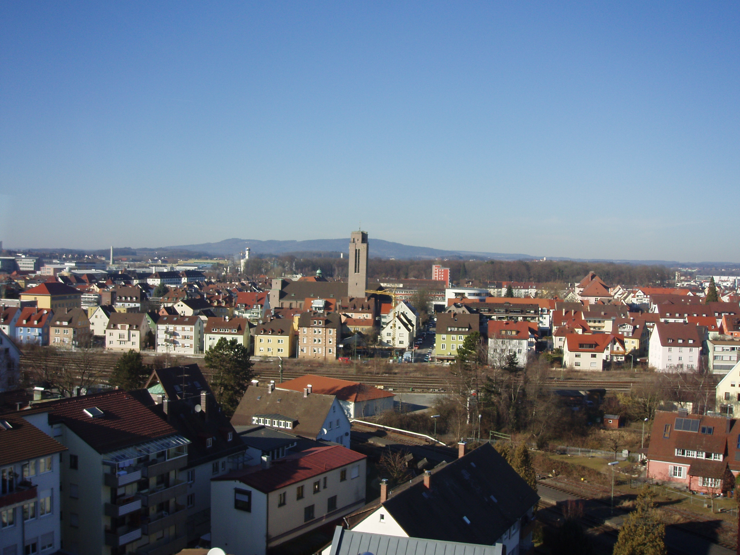 Blick über Friedrichshafen